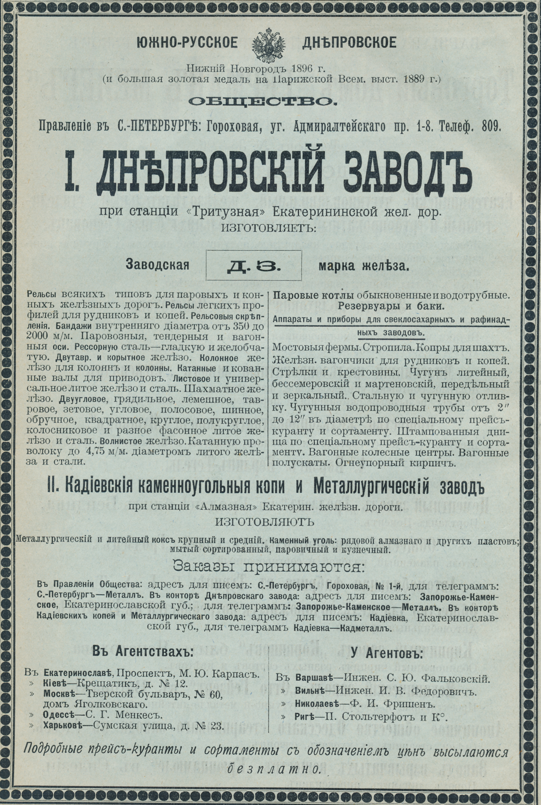 Реклама Днепровского завода, 1907 год.